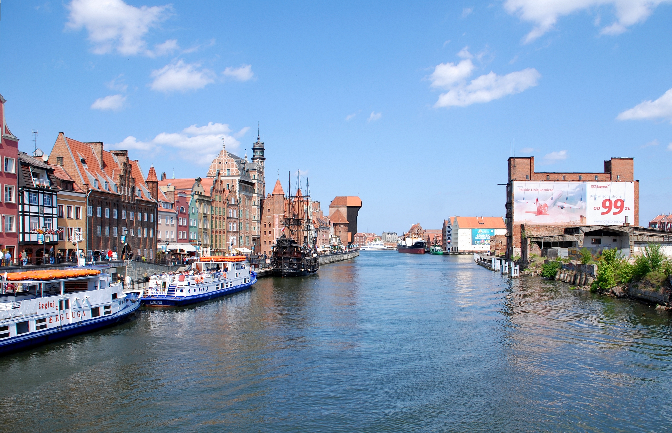 miasto Gdańsk